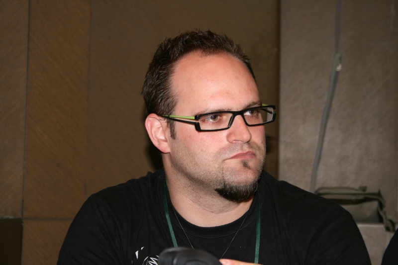 Darko Tuševljaković na SFeraKonu u Zagrebu